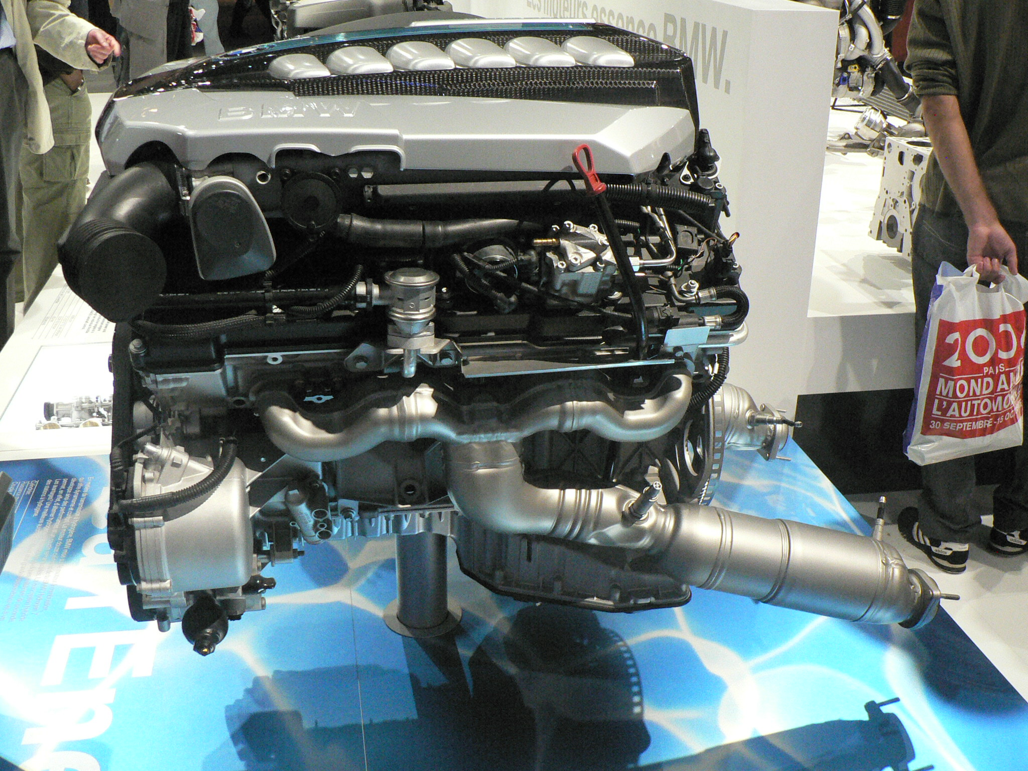 Mondial de l'automobile, Paris 2006